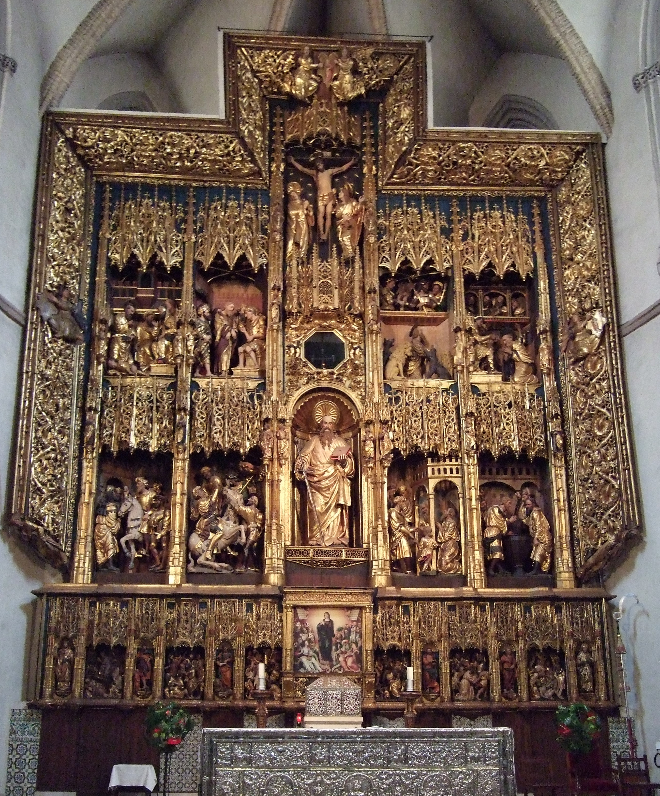 Zaragoza - Iglesia de San Pablo - Retablo mayor del s. XVI de Damián Forment